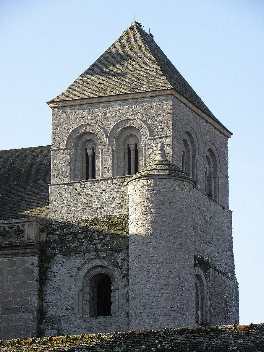 Tour Hastings de la cathédrale Saint-Tugdual de Tréguier (22). .